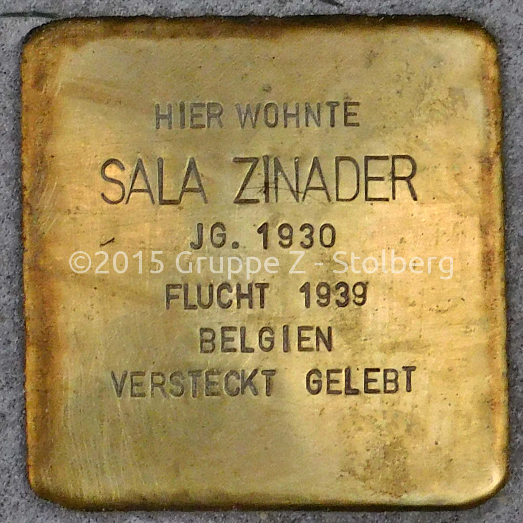 Stolperstein für Sala Zinader verlegt am 18. Dezember 2015